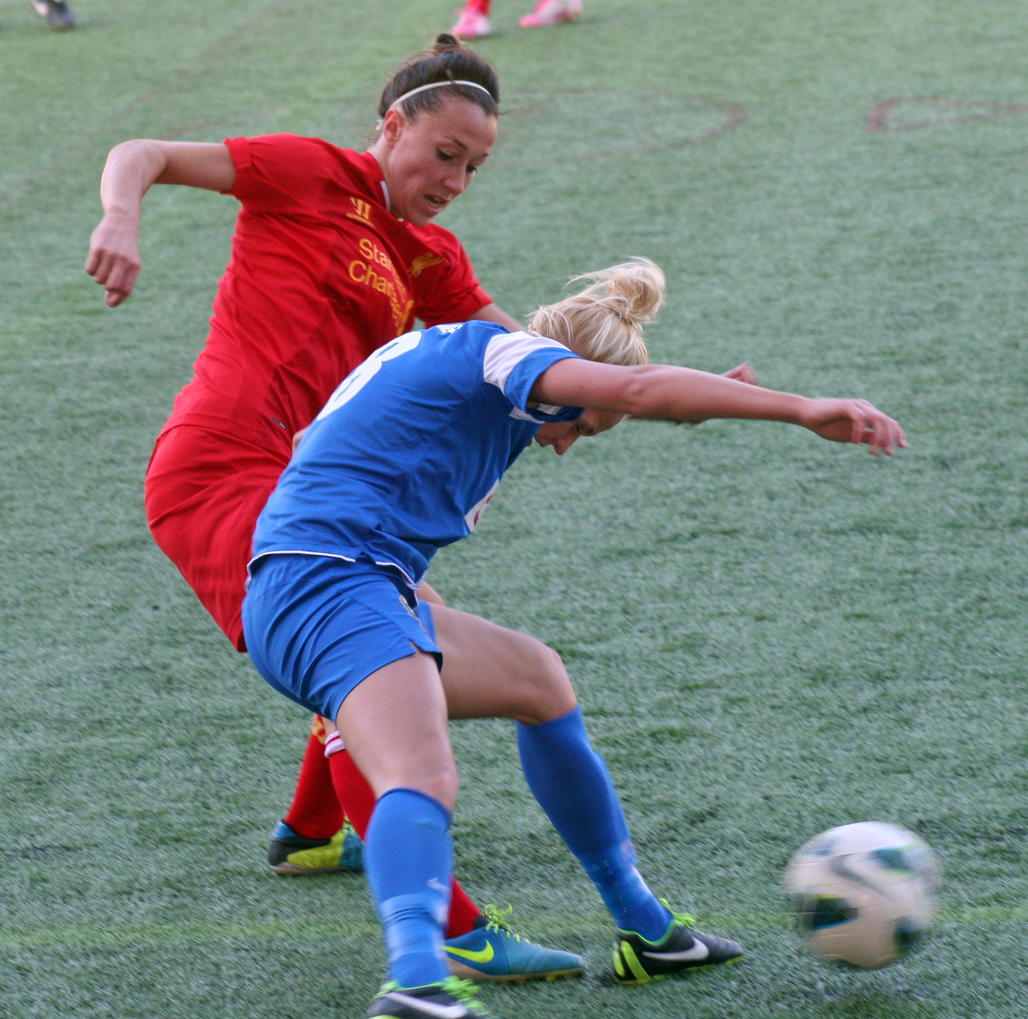 Lucy Bronze (2013)